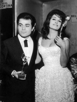 Dalida et son frère en 1963 en Italie